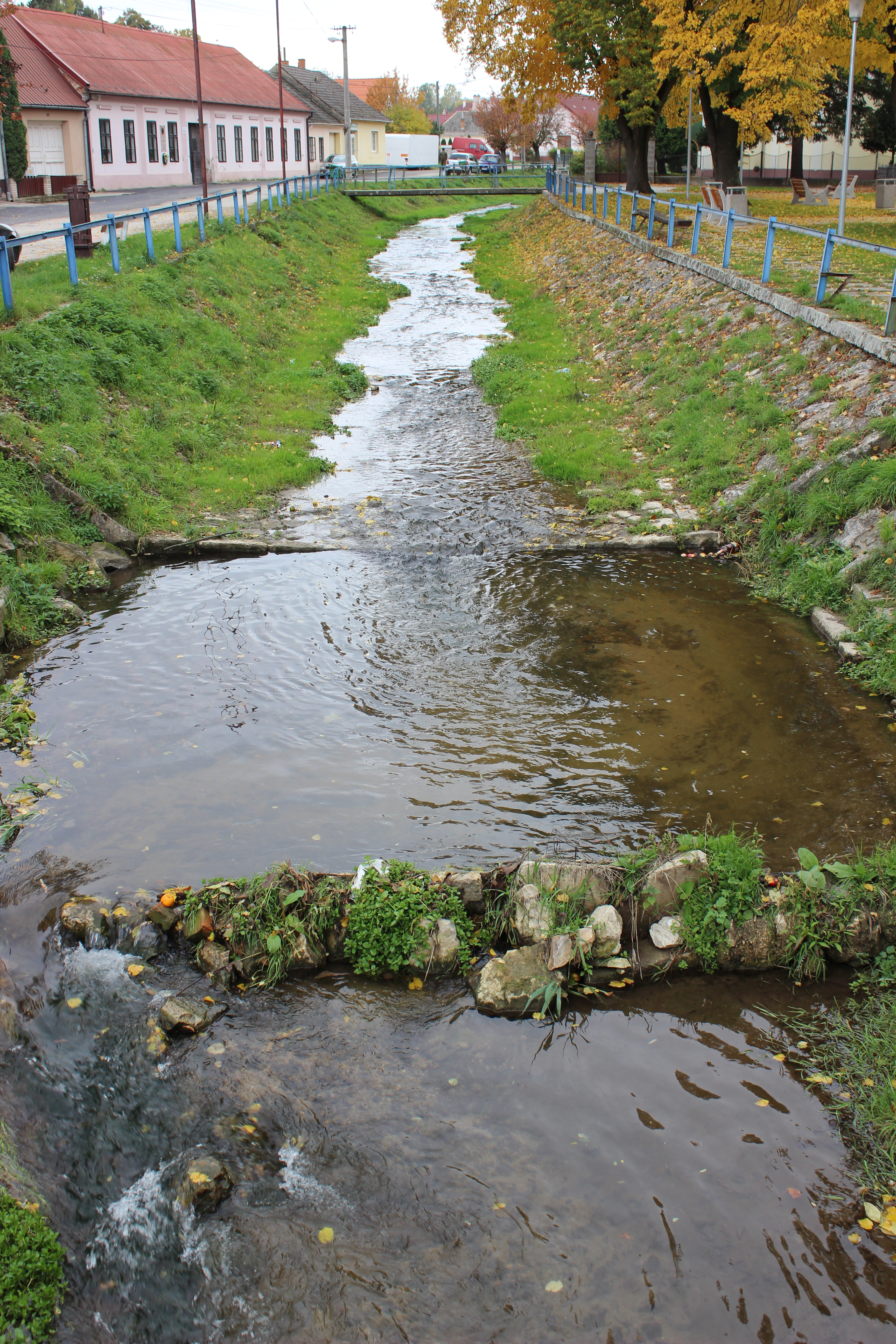 Vodní tok Kamečnica v Bzincích pod Javorinou.